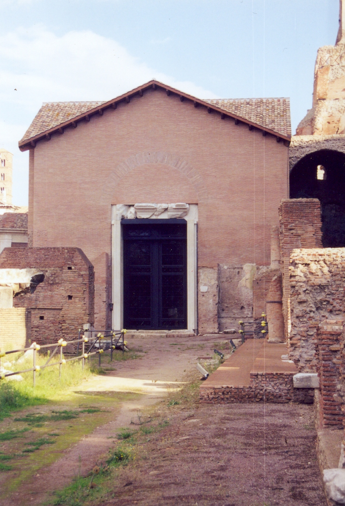 Front of Santa Maria Antiqua